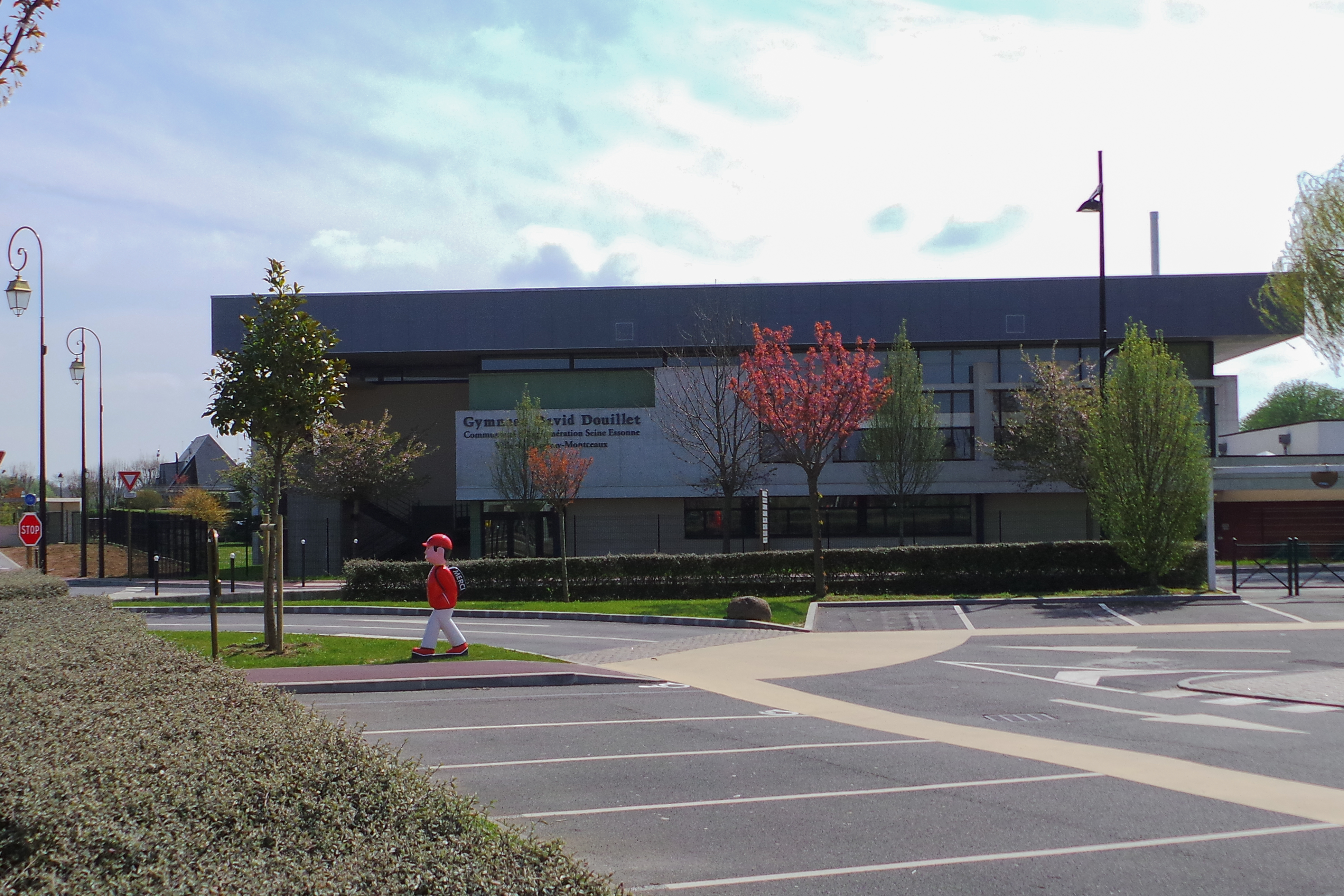 Gymnase David Douillet, Coudray-Montceaux, Essonne, France